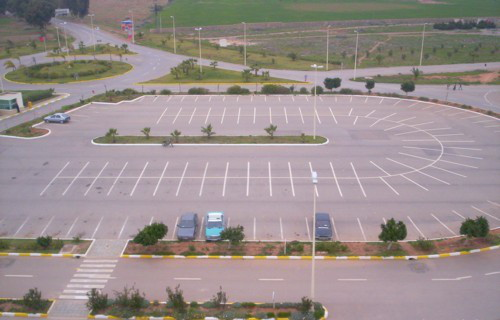 Aparcamiento del aeropuerto de Nador (Marruecos)